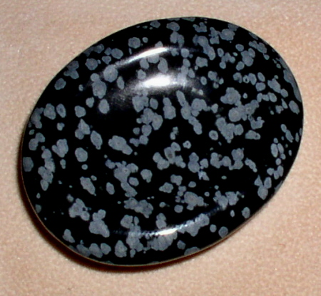 Eine flache Schale aus Schneeflocken-Obsidian sogenannter Daumenstein